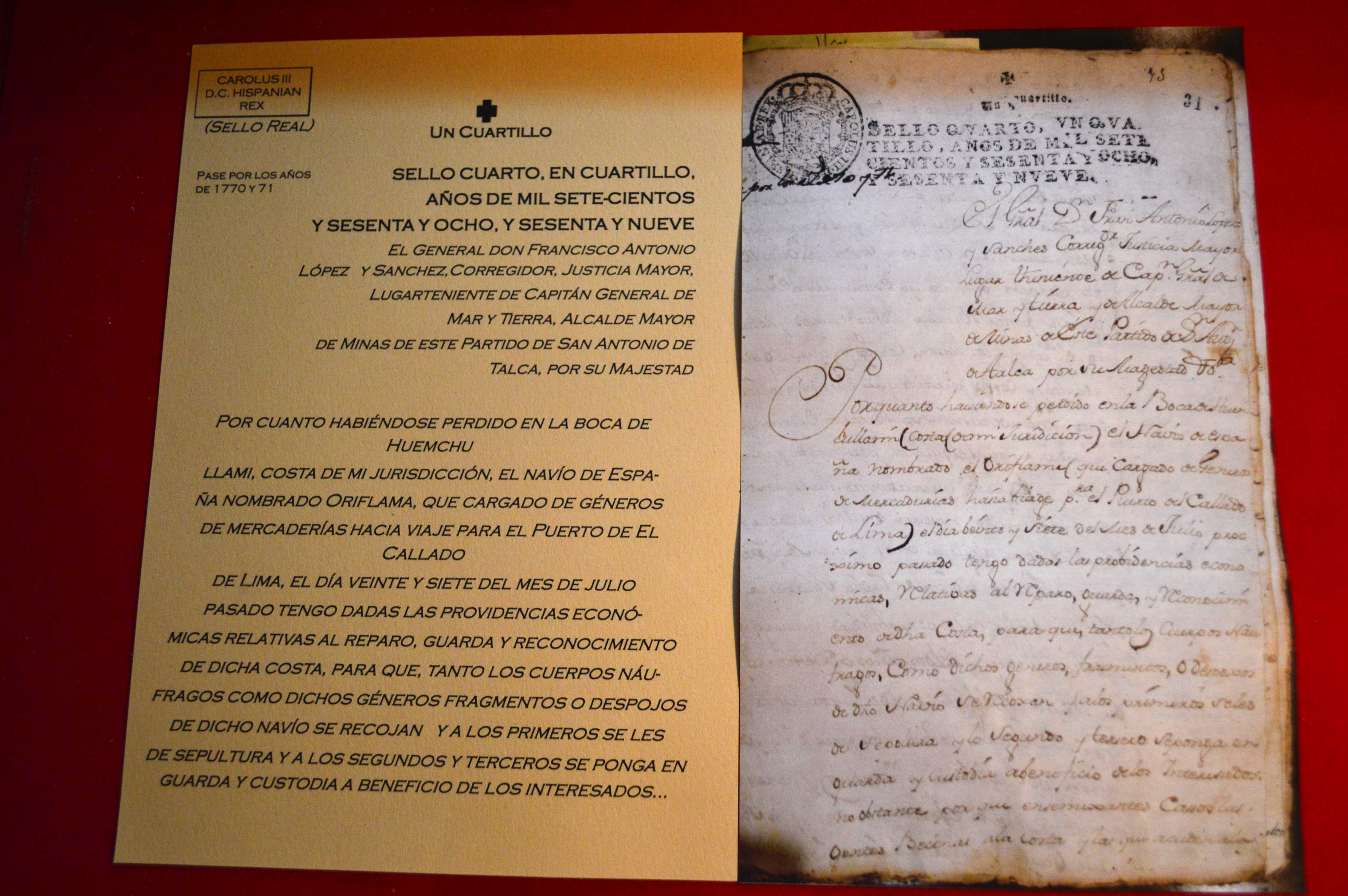 Docuemnto redactado por Francisco Antonio López y Sanchez, respectivo a la Busqueda del Oriflama despues de su Naufragio